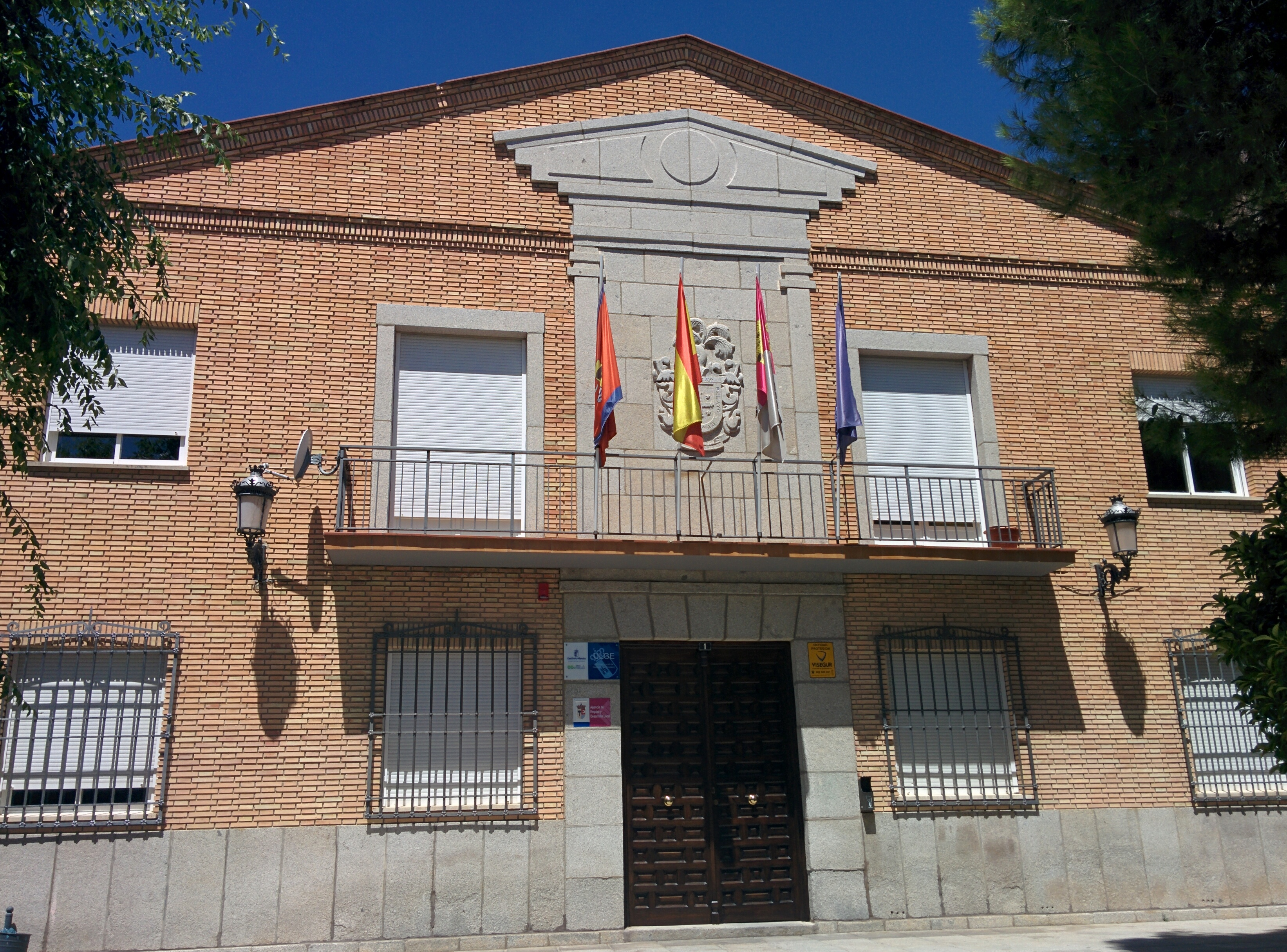 Vista frontal de la casa consistorial de Alameda de la Sagra (Toledo, España).